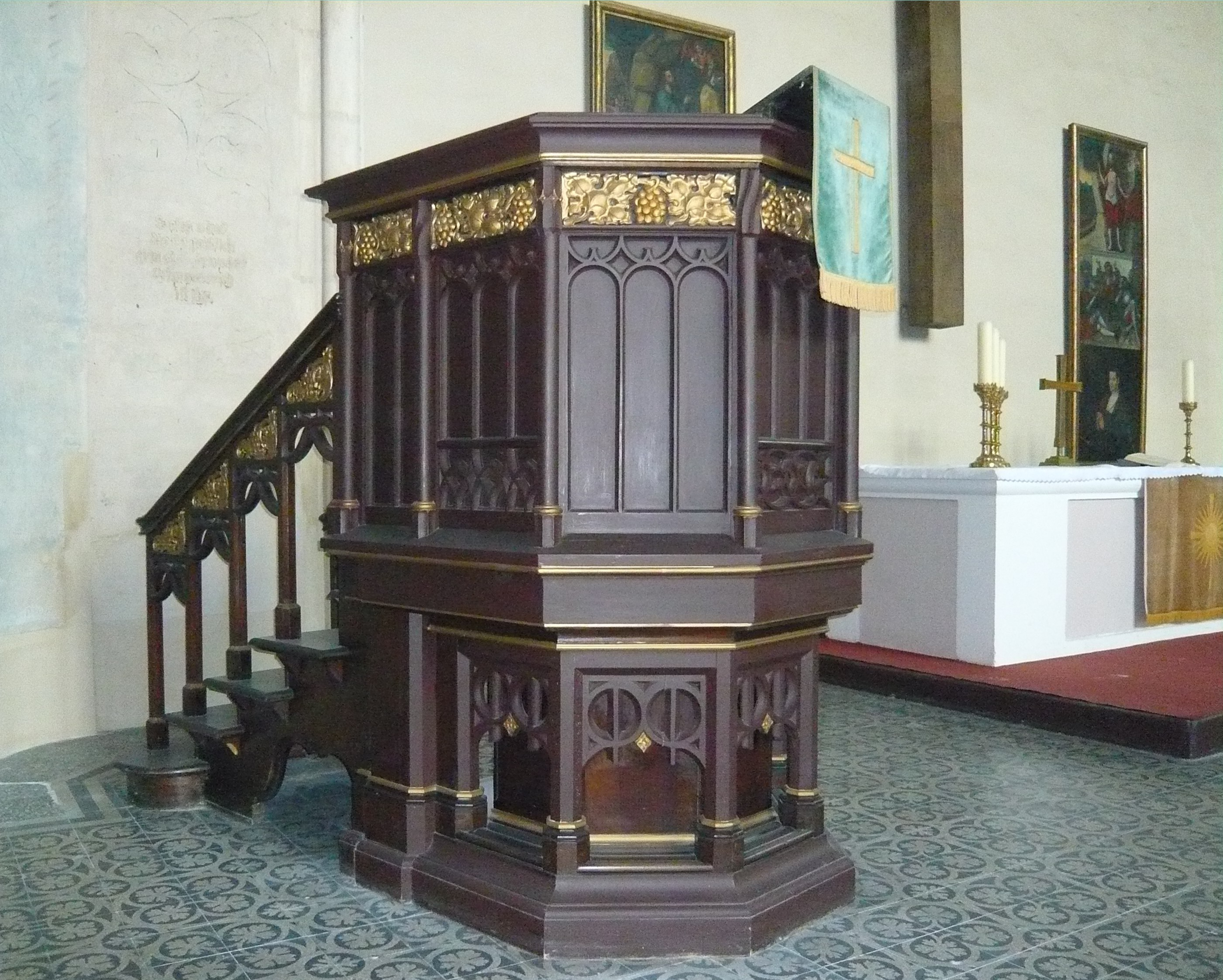 Ortsteil Friedrichshain: Pfingstkirche, Kanzel